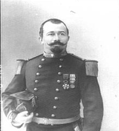 Henri Etienne Bretonnet